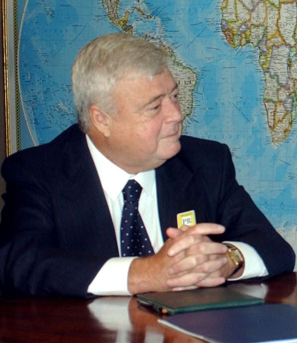 O presidente da CBF Ricardo Teixeira